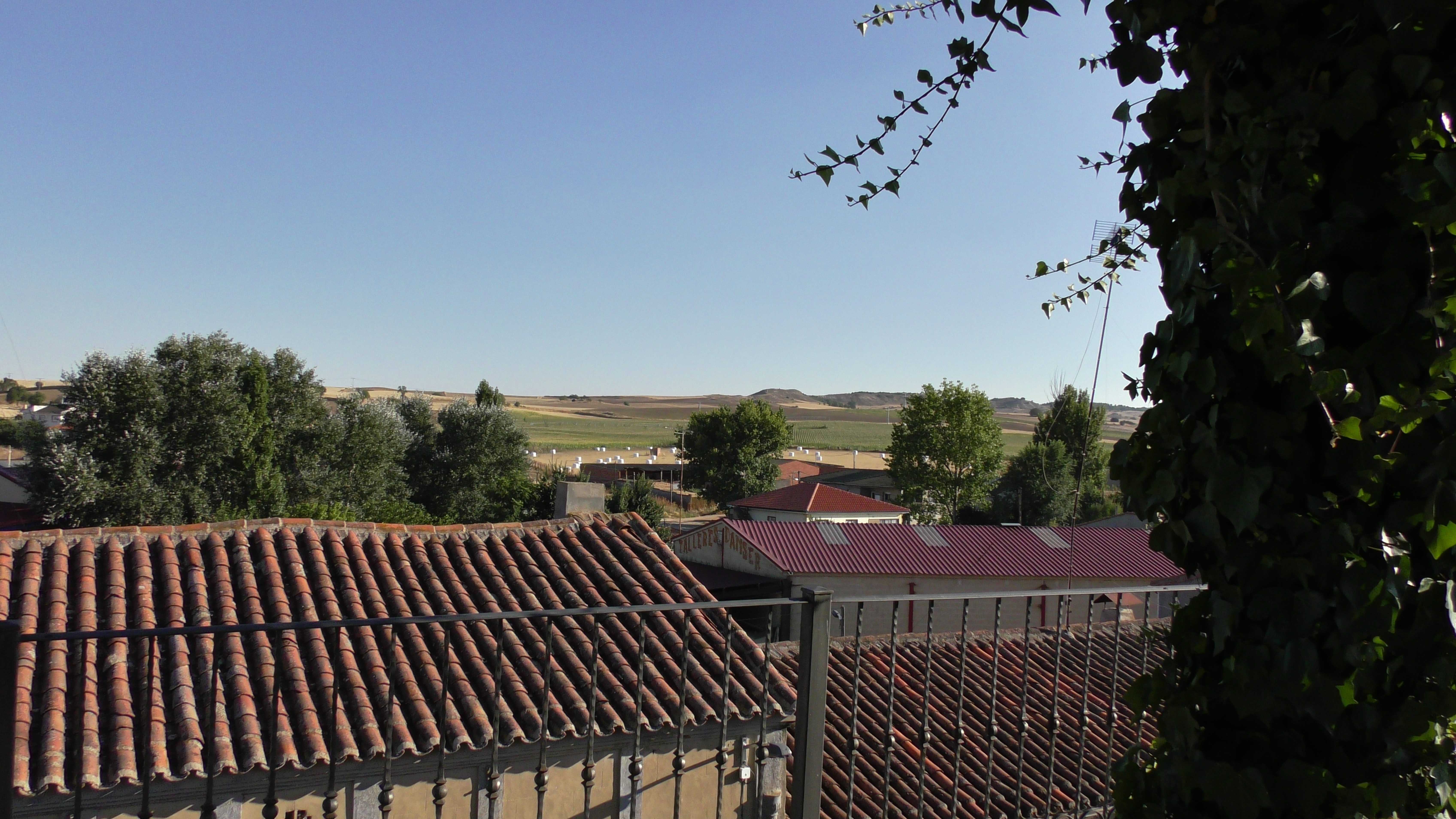 Fuentespreadas